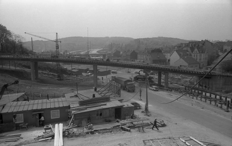 Sonnbornerkreuz in Wuppertal